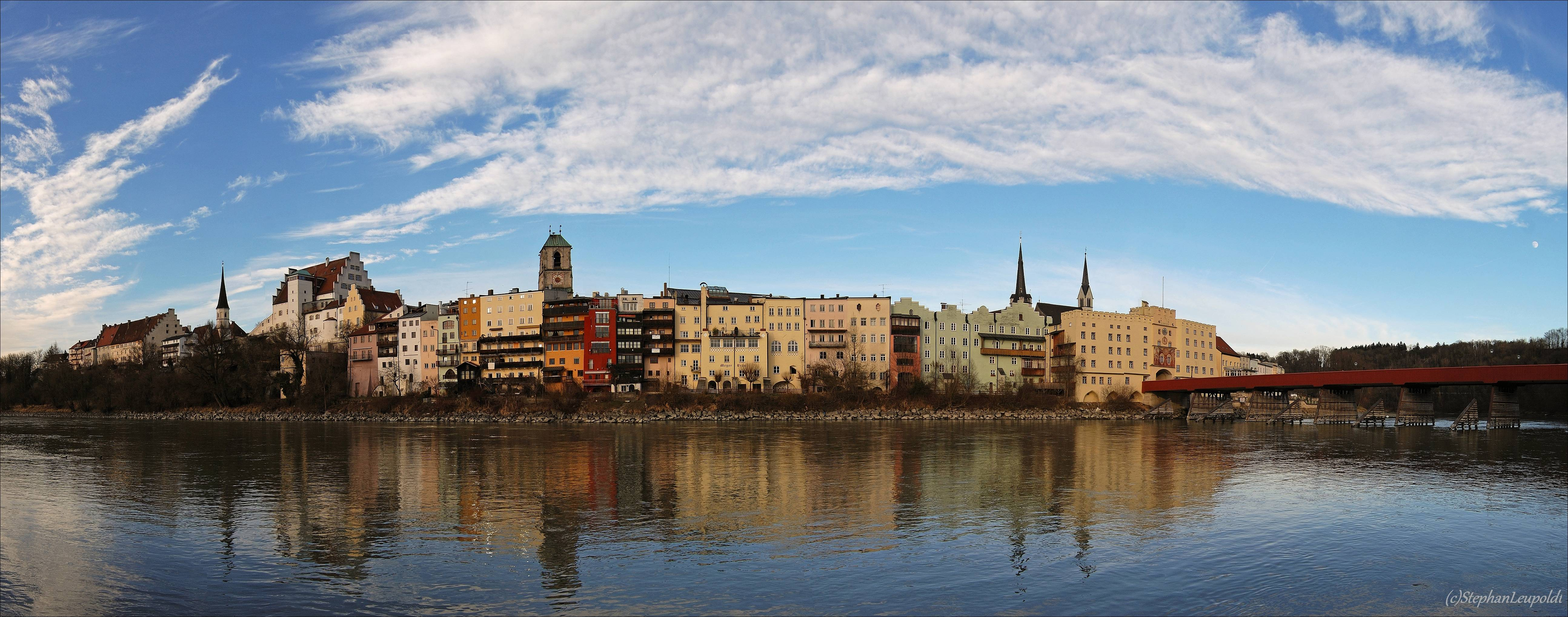 Die bekannte Stadtansicht Wasserburg am Inn als Panorama, erstellt aus mehreren Einzelbildern